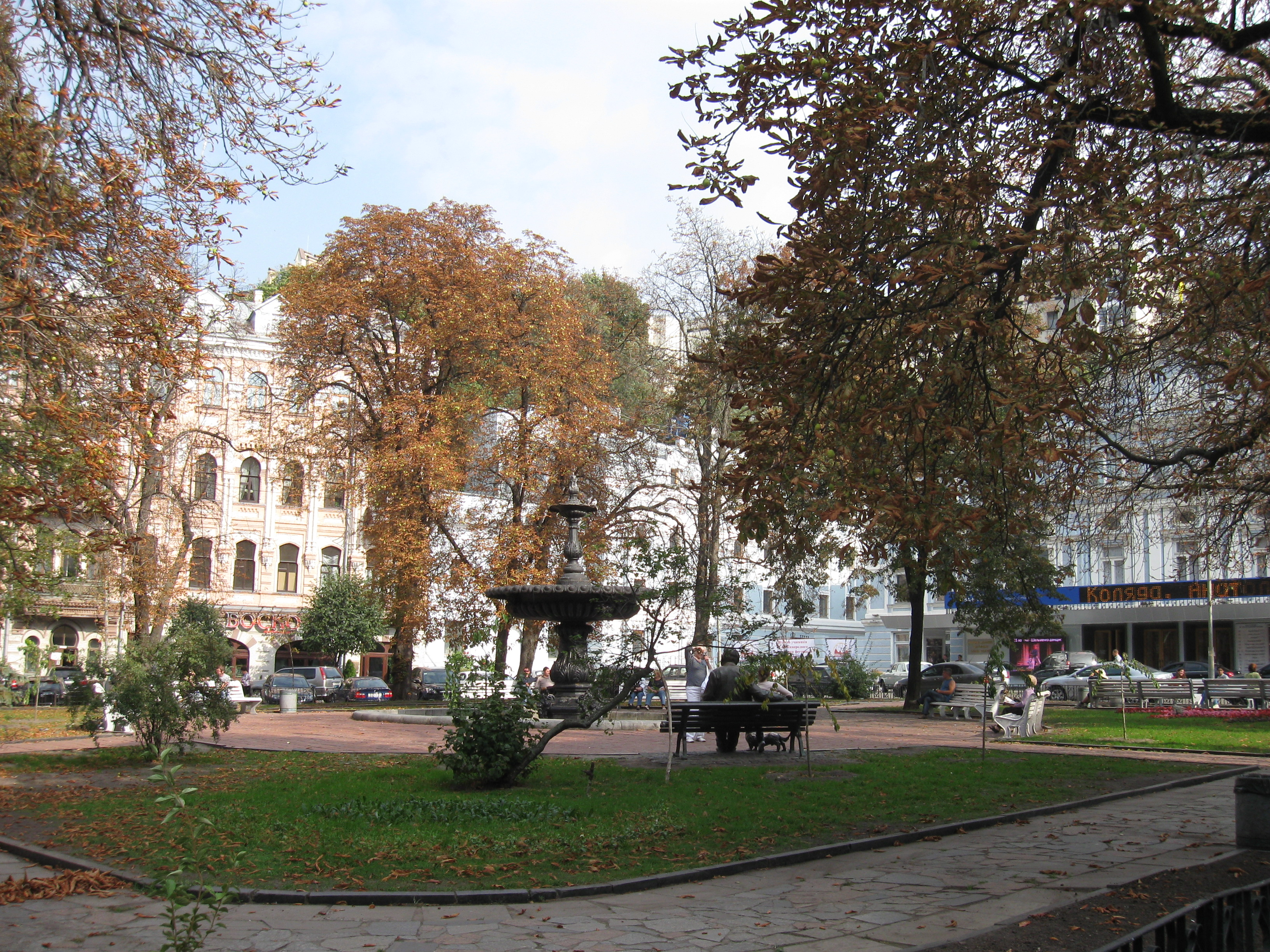 Площа_Івана_Франка_в_Києві.jpg: Площа Івана Франка в Києві, вересень 2009 року